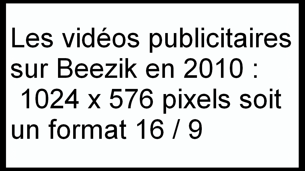 Les vidéos publicitaires sur Beezik en 2010 : 1024 × 576 pixels soit un format 16 / 9. Le visionnage de ce fichier dans la taille par défaut (100 %) de ce fichier permet de connaitre la taille des vidéos sur Beezik.